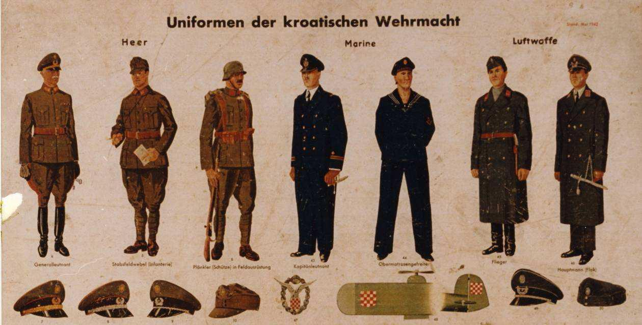 Odore pripadnika Hrvatskog domobranstva (NDH)